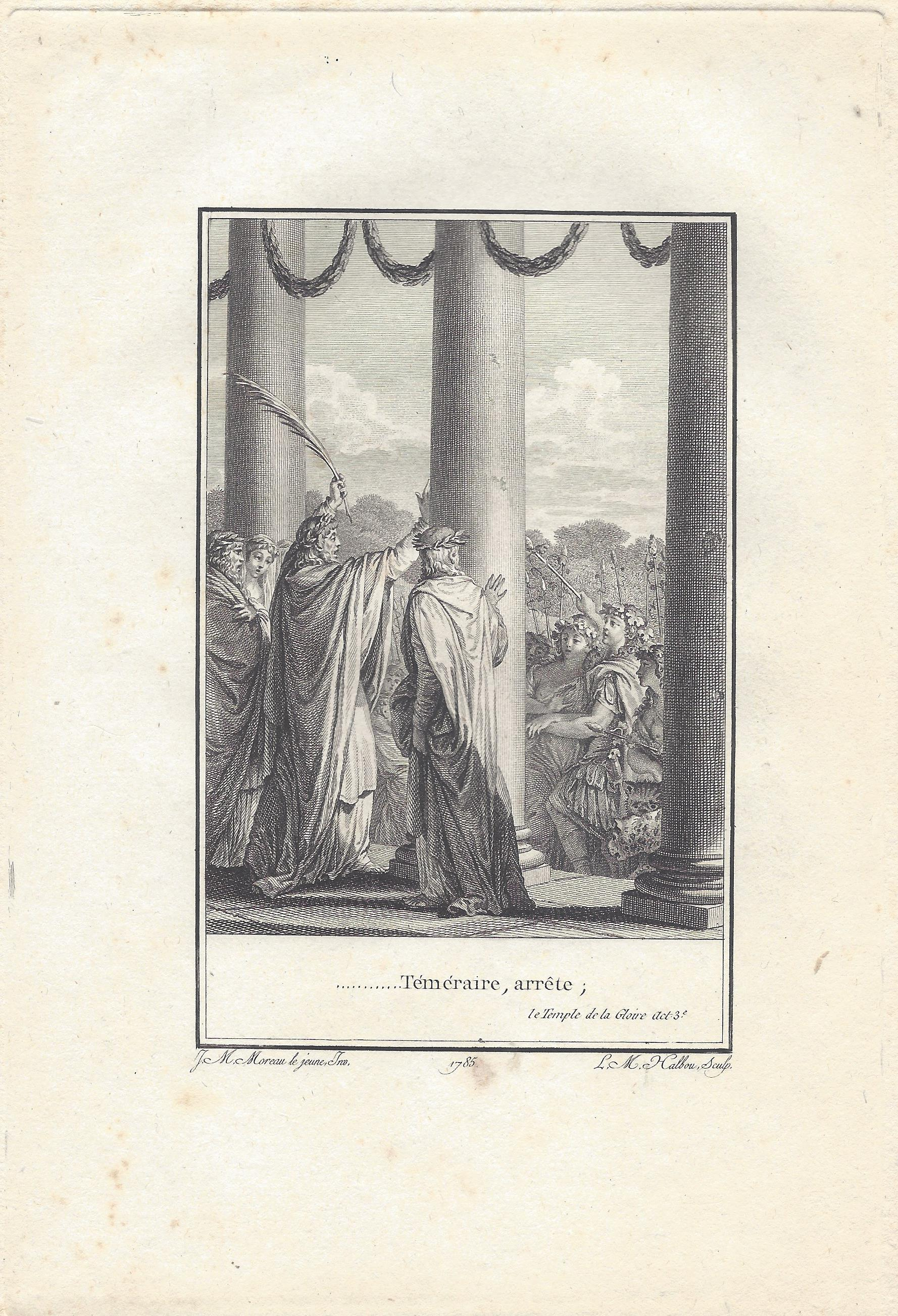 Voltaire: Le Temple de la Gloire Akt 3 Kupferstich von Louis-Michel Halbou nach Jean-Michel Moreau